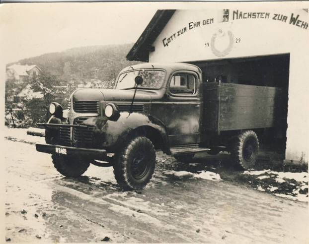 LF Dodge